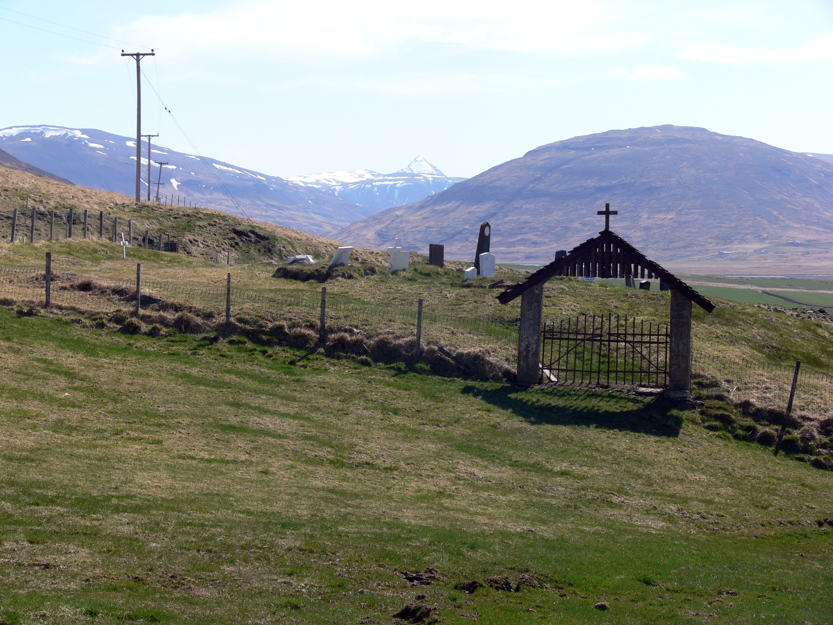 Friedhof neben dem Hof Sauðafell. Hier muss irgendwo die Kirche gestanden haben, in der sich Bischof Jón Arason vor der Gefangennahme verschanzt hatte. Im Hintergrund vor den Bergen ist Miðdalir zu erkennen, der einzige Weg in Westisland vom Nordland in das Südland.